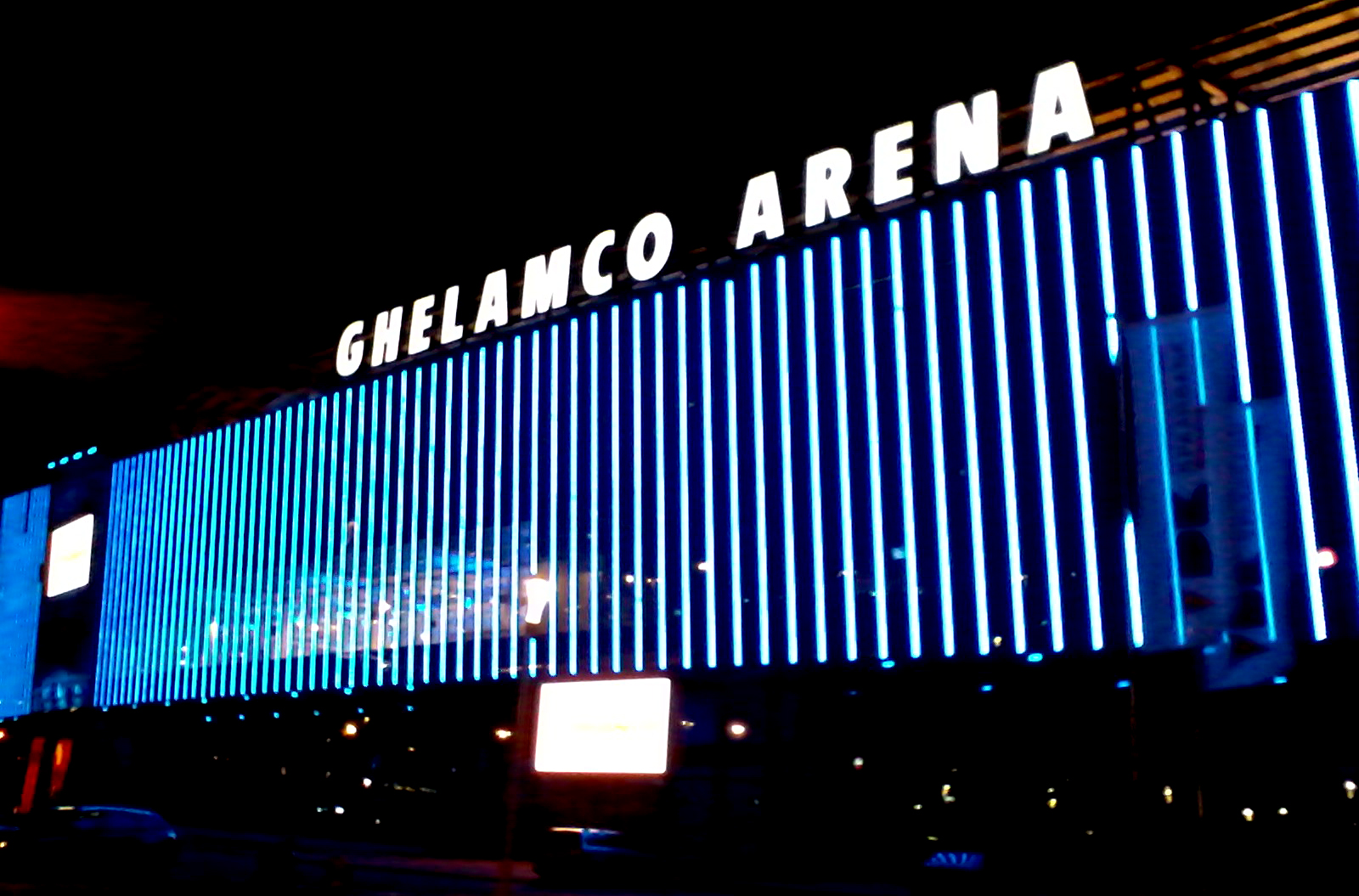 Ghelamco Arena, voetbalstadion KAA Gent, België